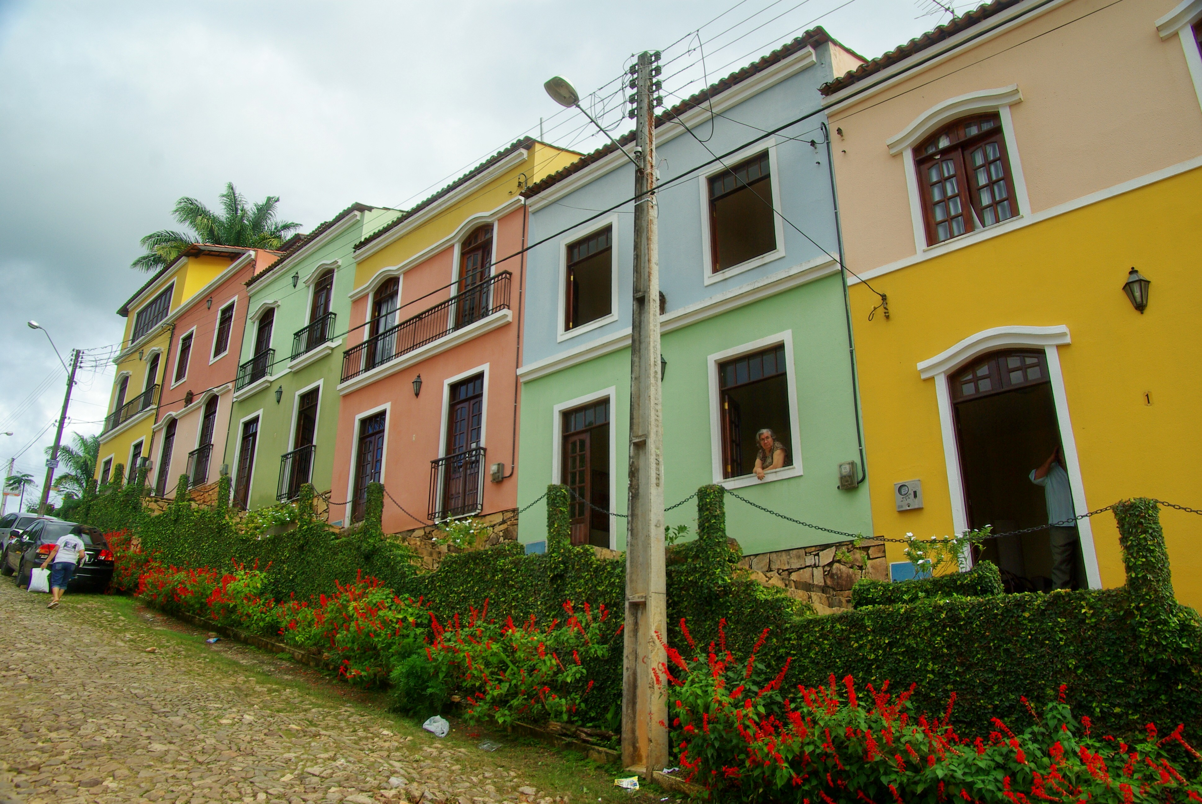 Guaramiranga (1)